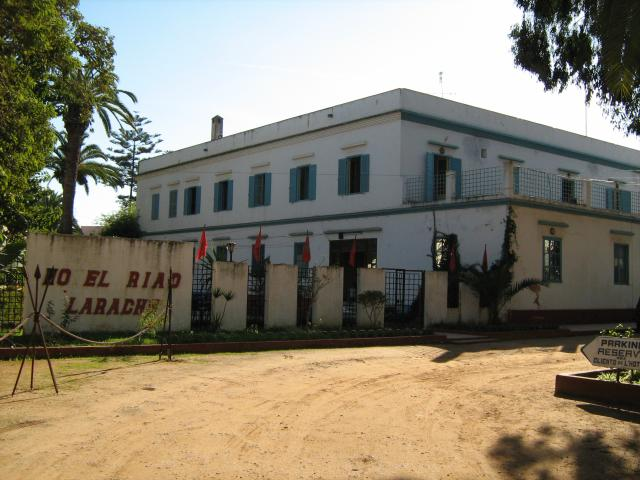 Ancienne résidence du duc et de la duchesse de Guise à Larache, Maroc. Actuellement hôtel Riad.